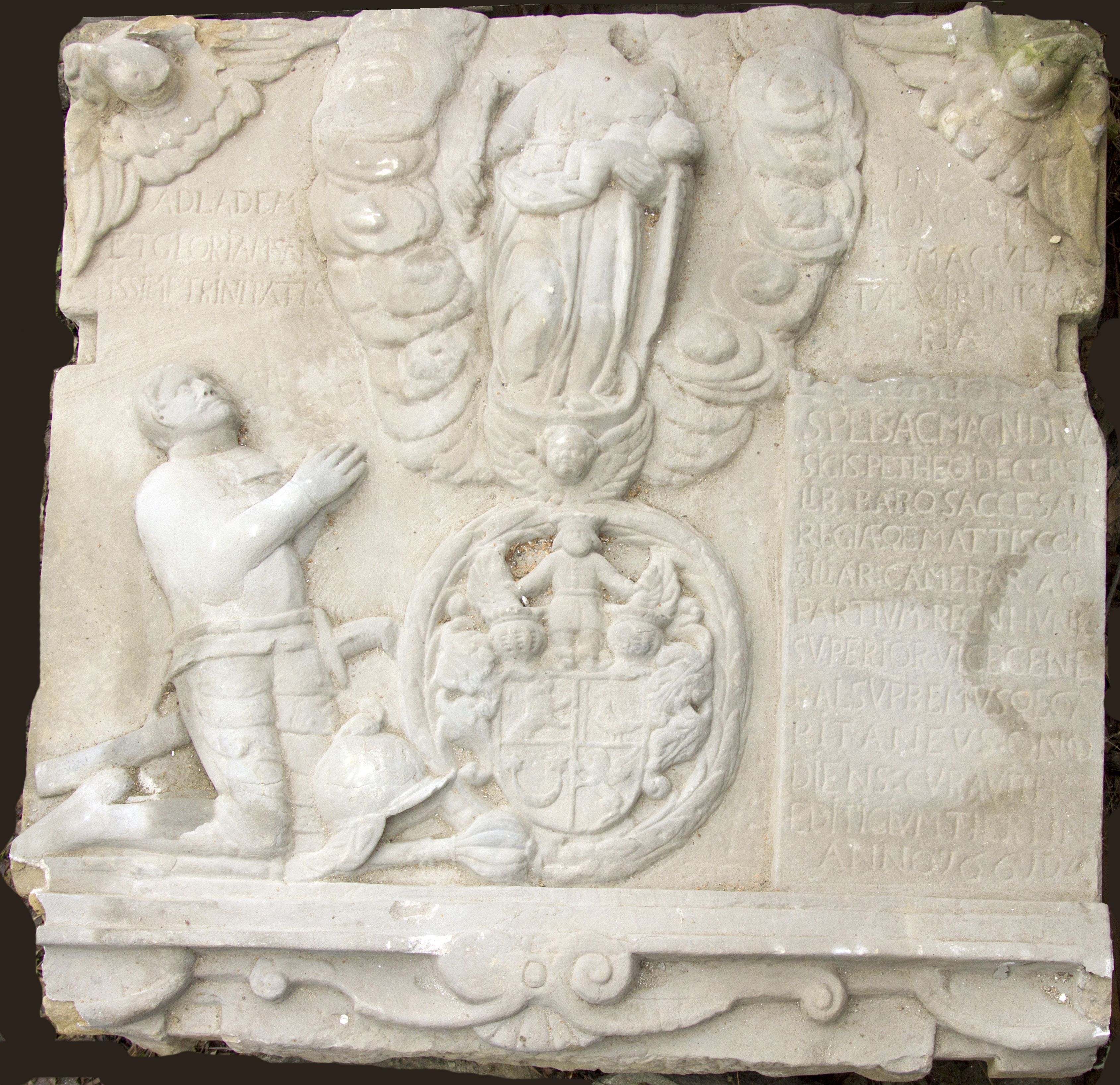 Na tabuli je vyobrazený kľačiaci Žigmund Pethő z Gerše pred Pannou Máriou v oblakoch